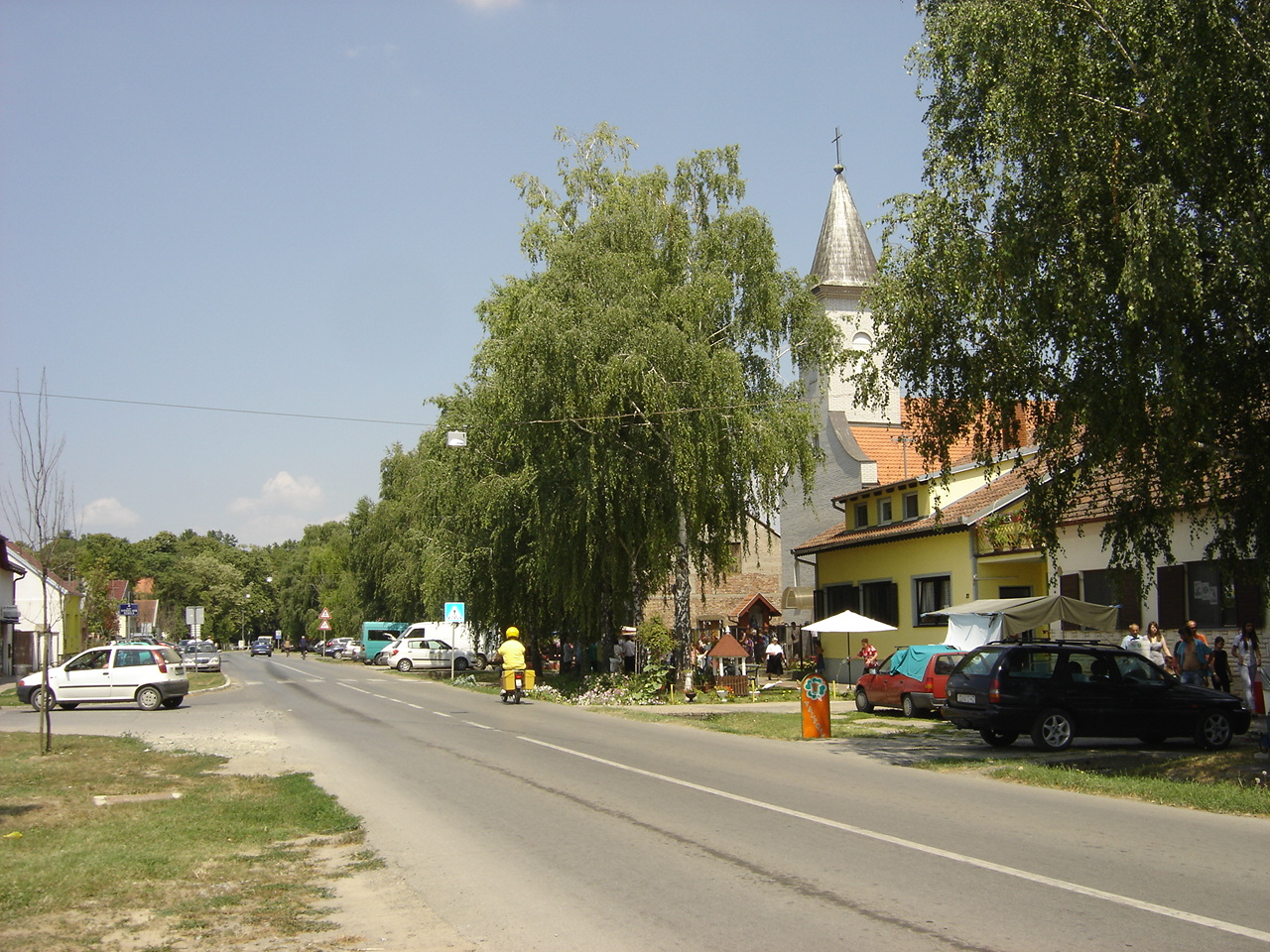 Ulica svete Ane u Tenji